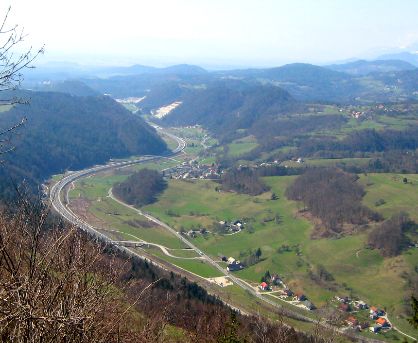 A1 highway in Slovenia, near Krašnja (view from Limbarska gora)